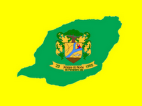 Bandeira do município amazonense de Atalaia do Norte.